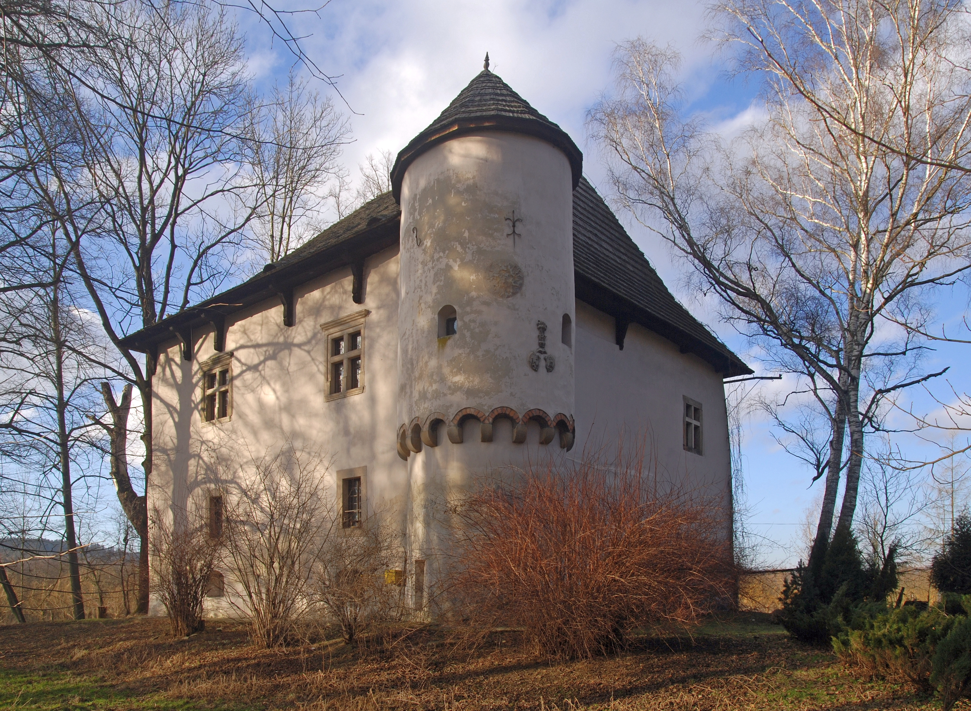 wieś Wilczyska (województwo małopolskie)